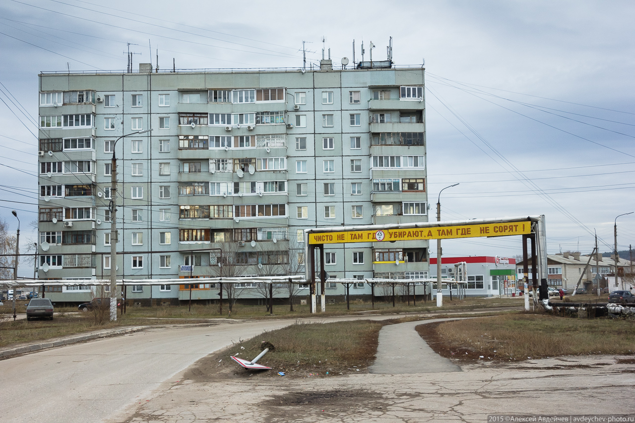 Современные дома в селе Курумоч